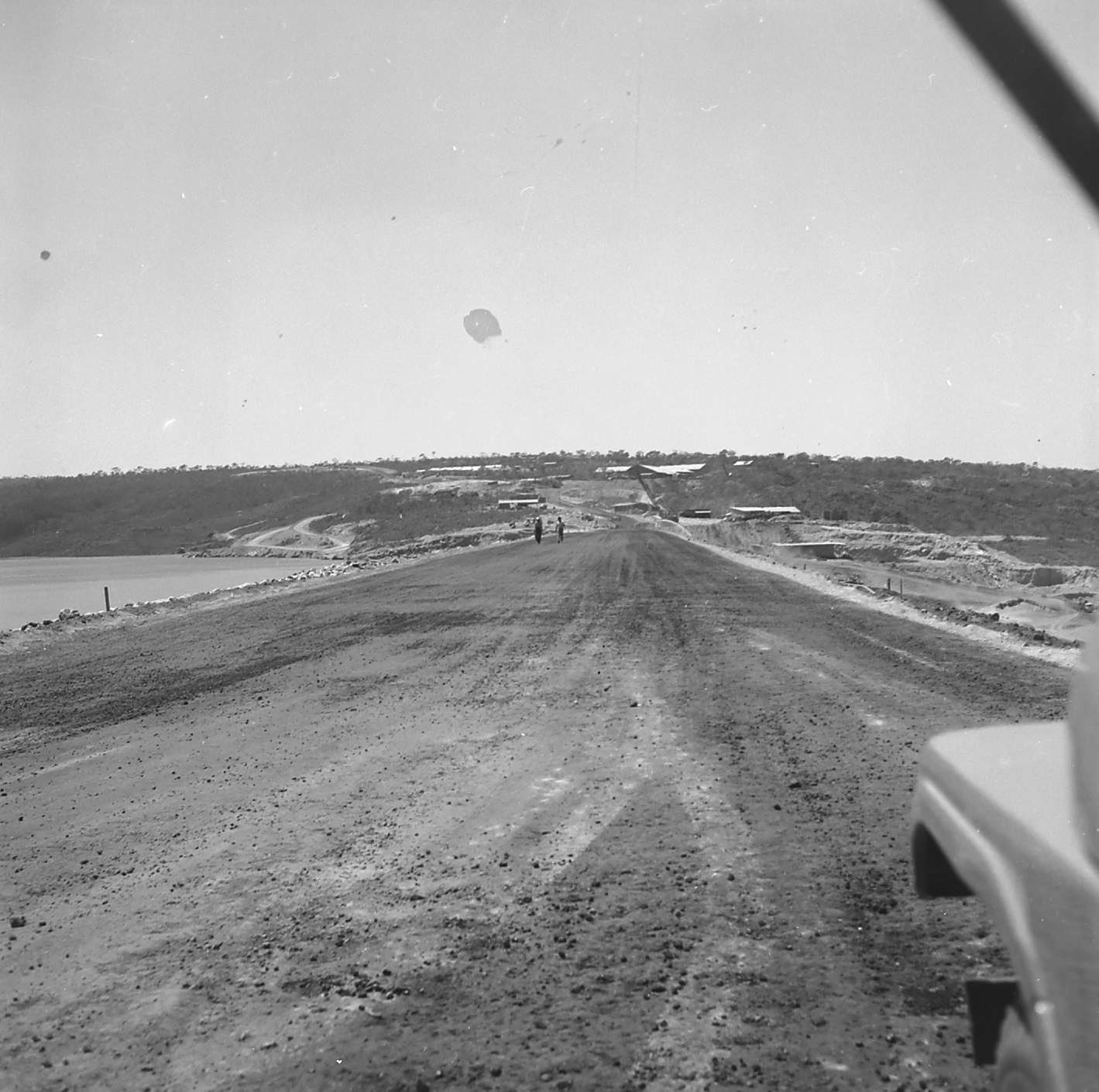 Construção da Barragem do Lago Paranoá, em Brasília (DF)_1